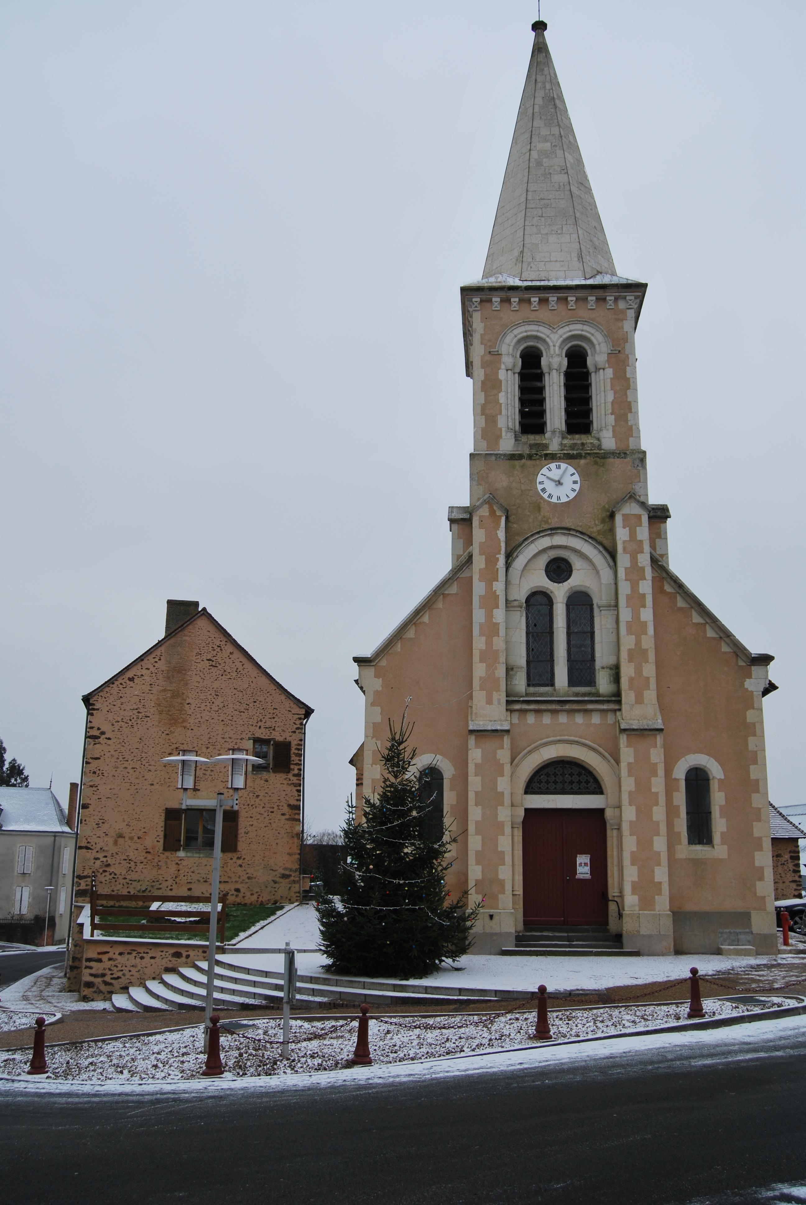 L'église et le presbytère de Saint-Georges-du-Bois dans le département français de la Sarthe en janvier 2010.